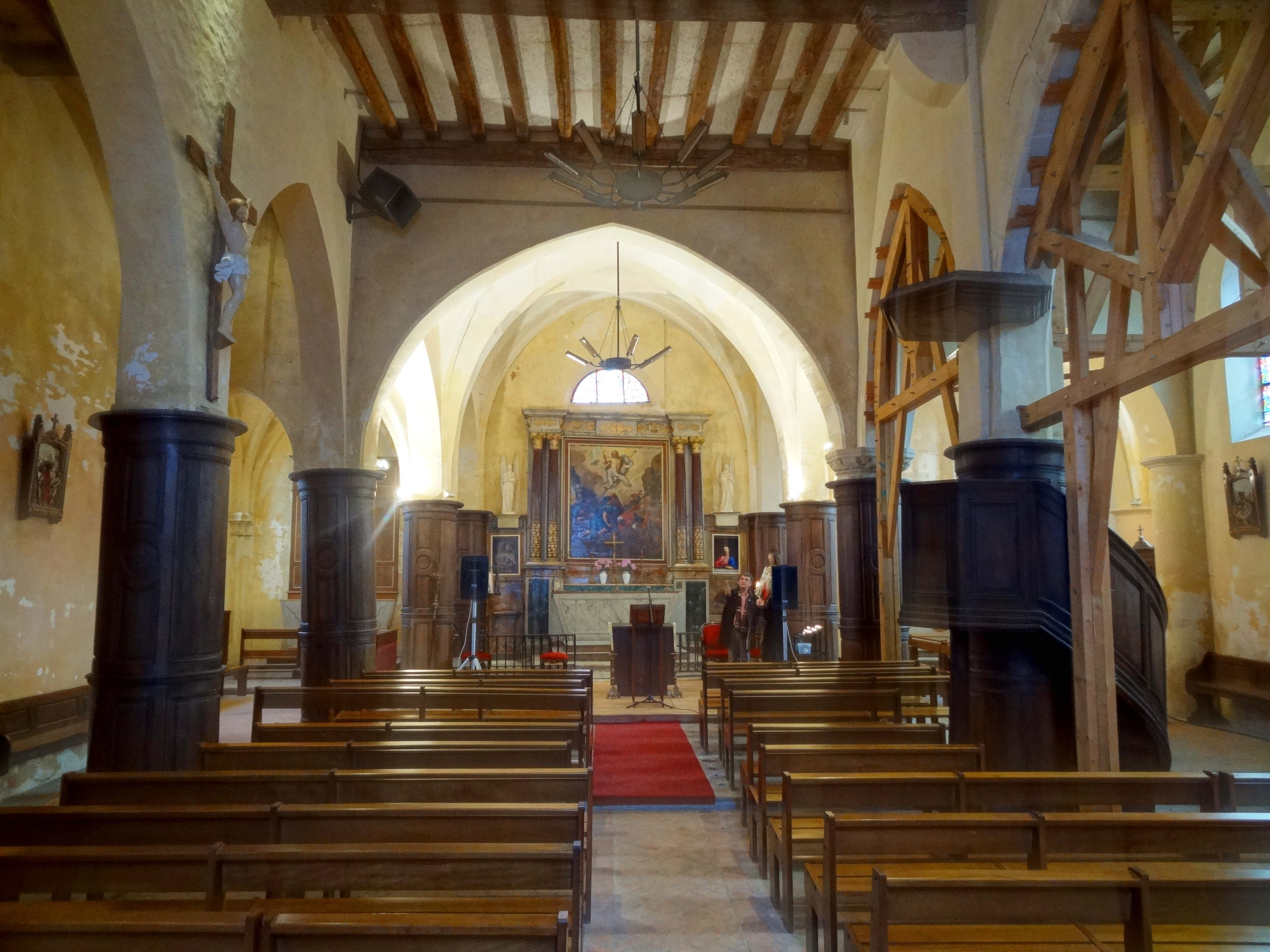 Intérieur de l'église - voir titre.